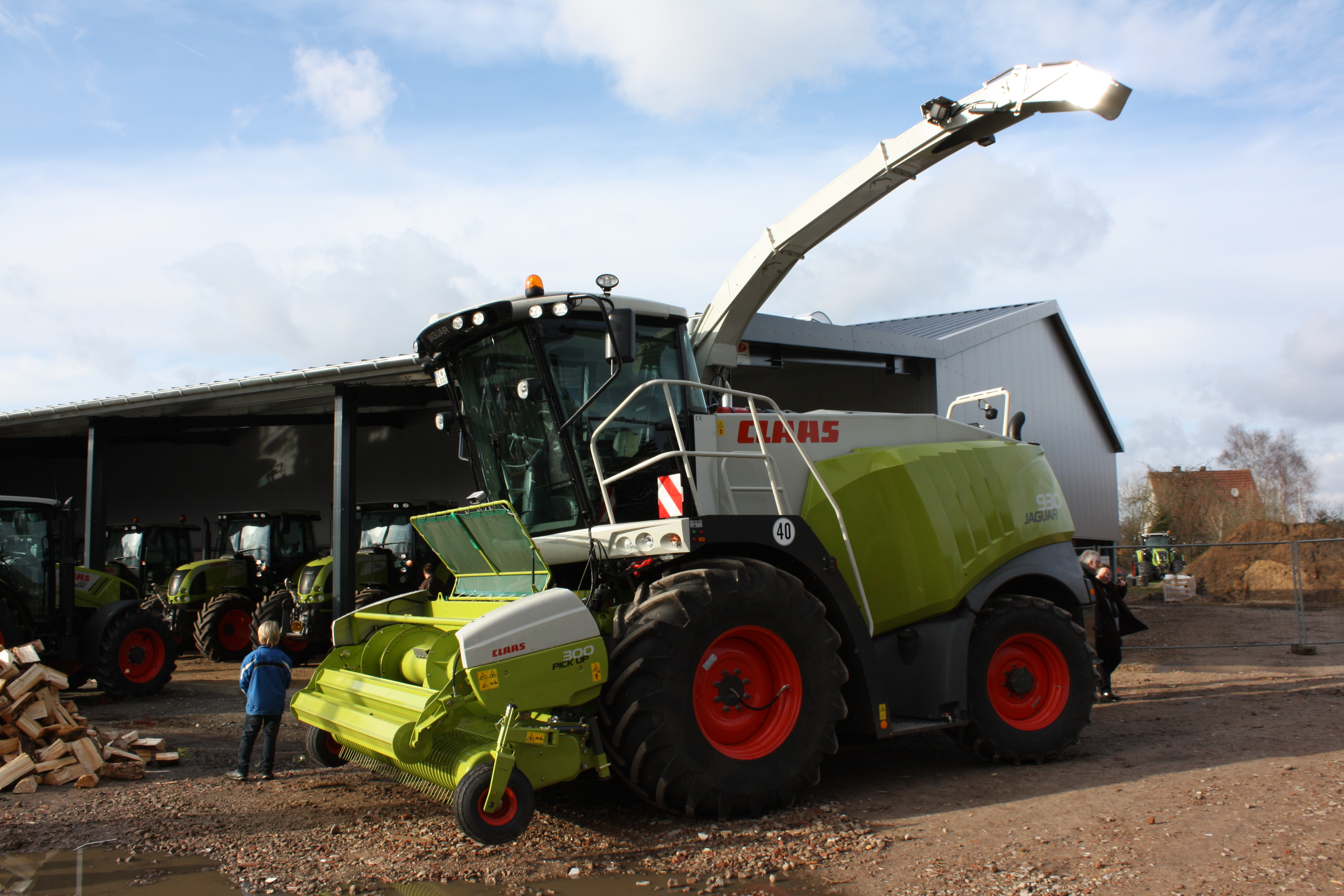 Claas Jaguar 930 mit Pick Up 300